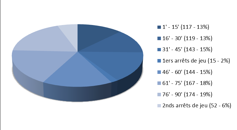 Statistiques illustrant le nombre de buts marqués tous les quarts d'heure pendant le championnat de football de Ligue 1 (2011-2012)